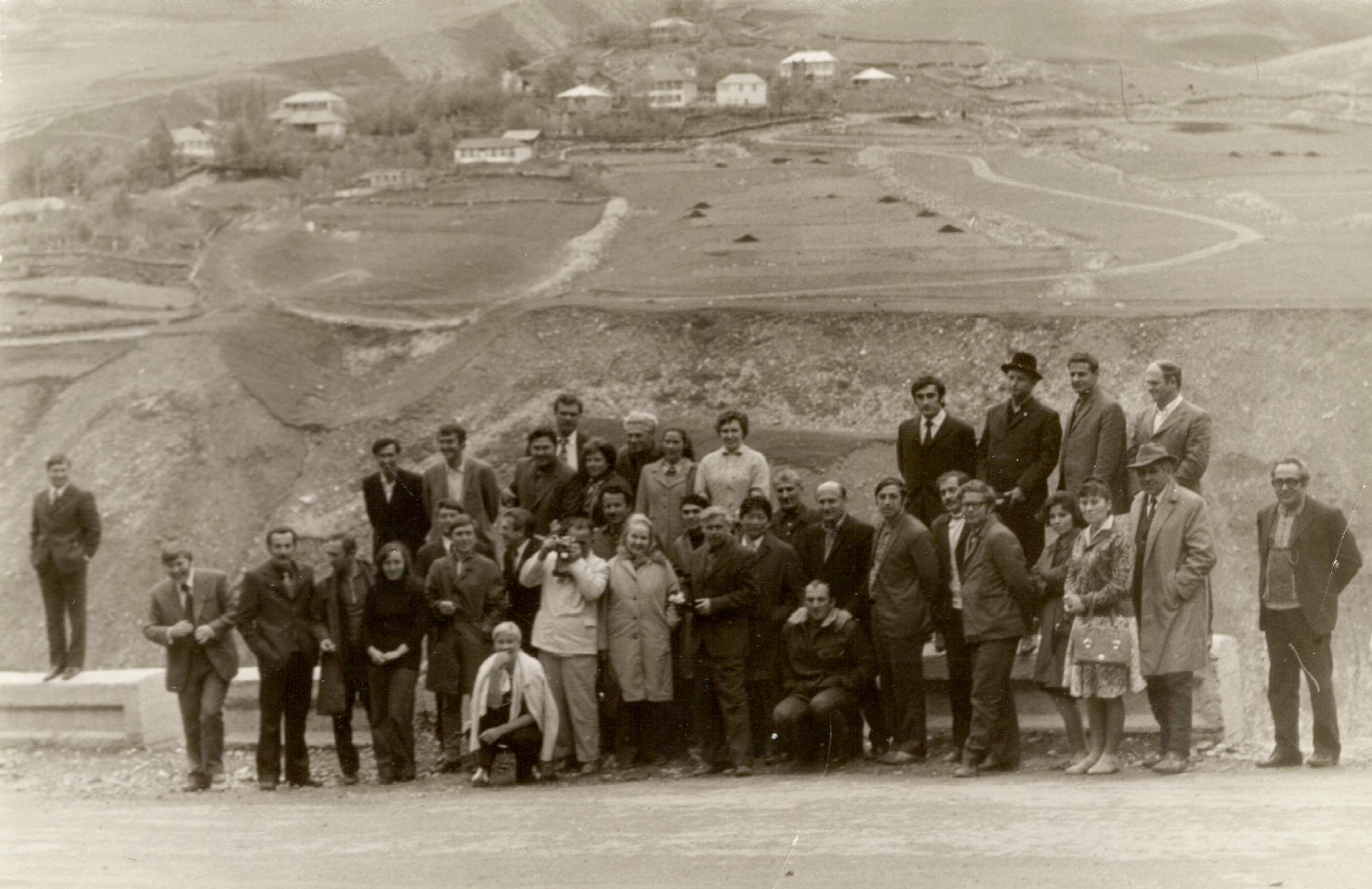 Участники научно-технического совещания по вопросам методики картирования селей, организованного Селевой комиссией в мае 1974 года. Грузия, верховья долины реки Белая Арагви